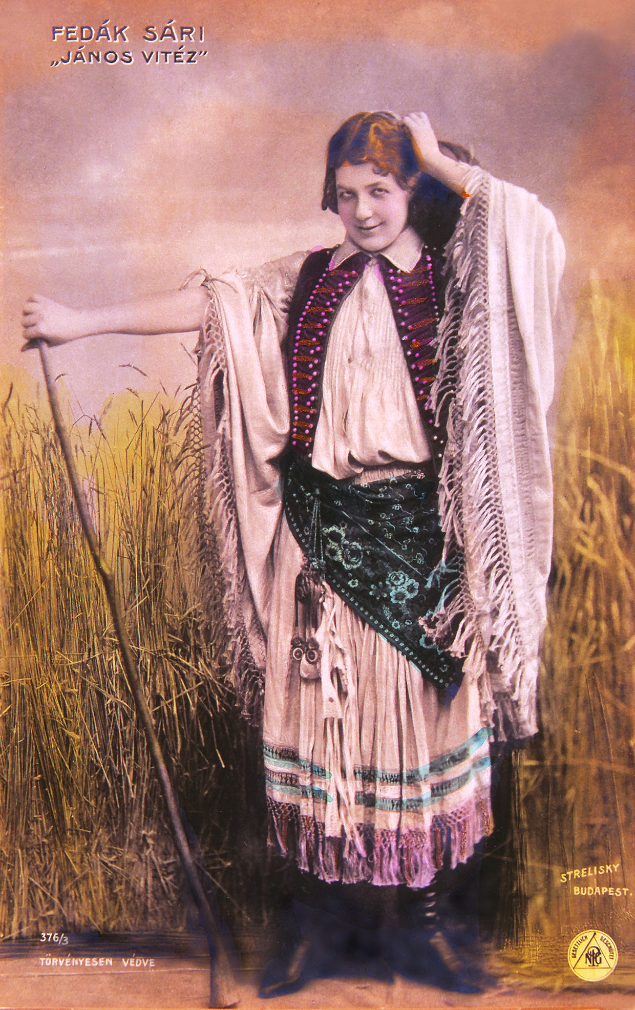 Fedák Sári Kacsóh Pongrác János vitéz című daljátékának címszerepében National Széchényi Library LocationBudapestCoordinates47° 29′ 53″ N, 19° 02′ 14″ E Established1802Website